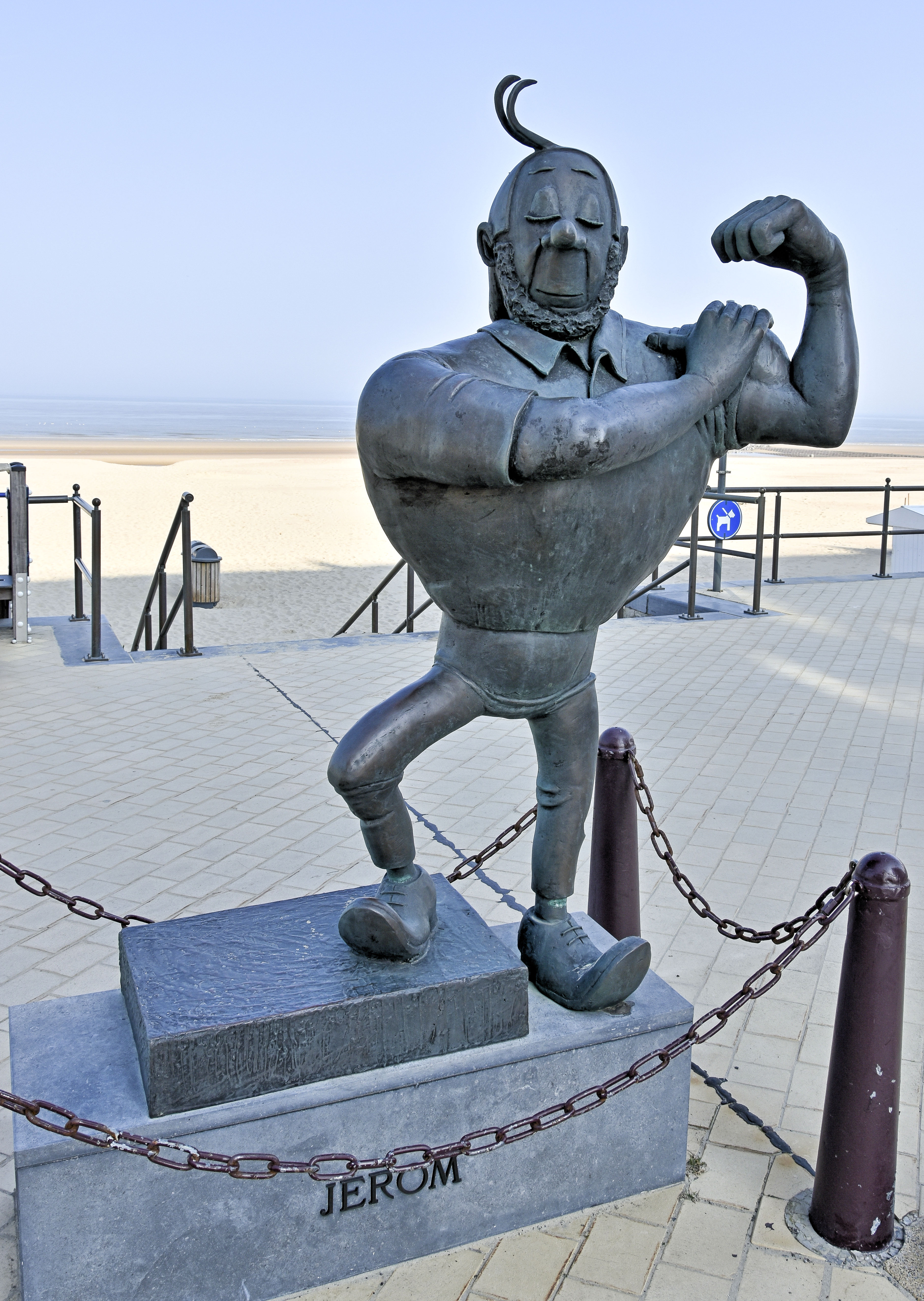 Jan Maillard - Nero - Stripstandbeelden Middelkerke